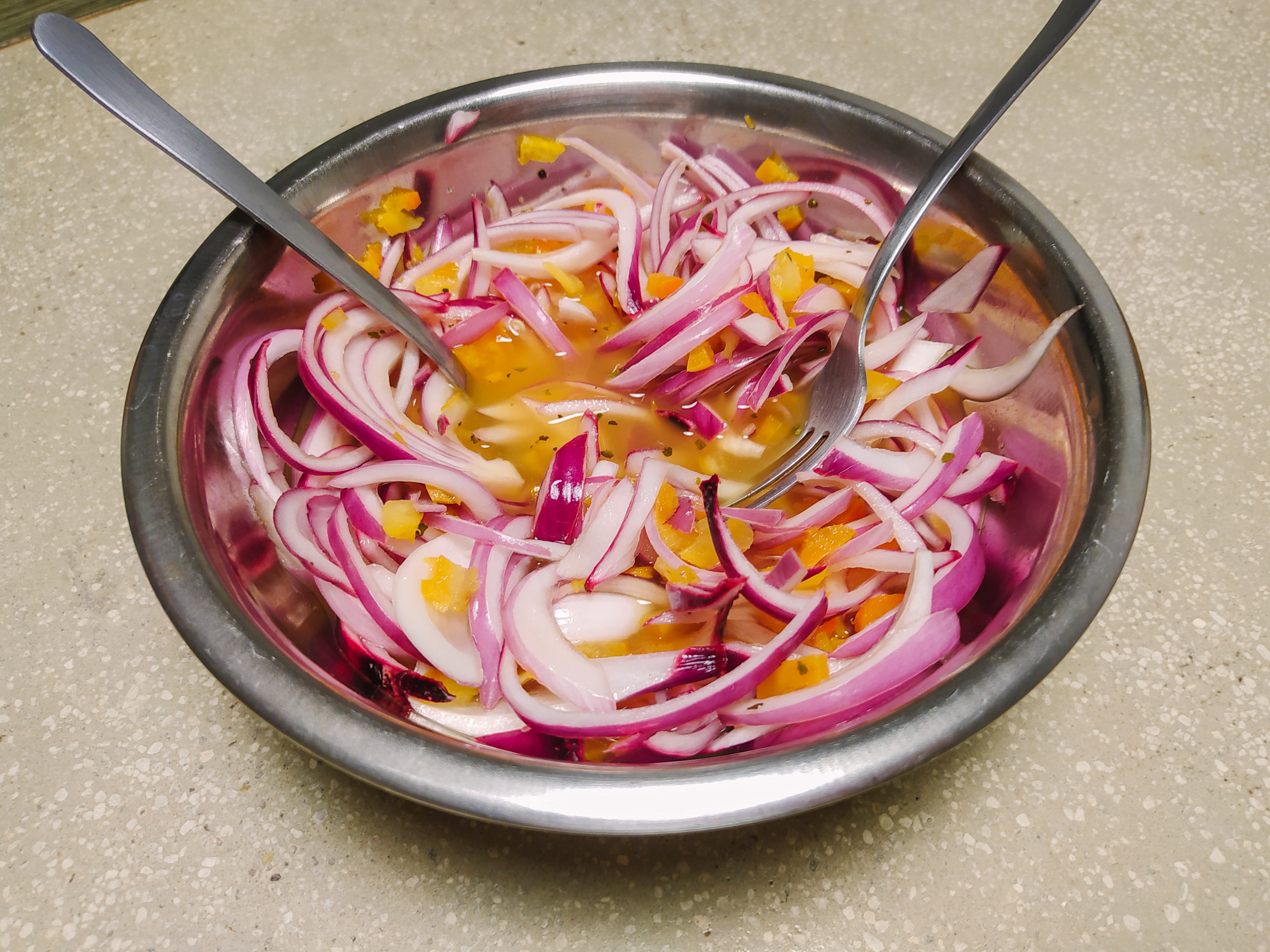 Deliciosa salsa yucateca o "Xnipec" (/i∫ni'pek/) con su cebollita morada cortada en plumita, su chile habanero bien picosón, su jugo de naranja recién exprimido, orégano mexicano y sal! Muy fácil y combina muy bien con filete de pescado, cochinita, tacos... 😍